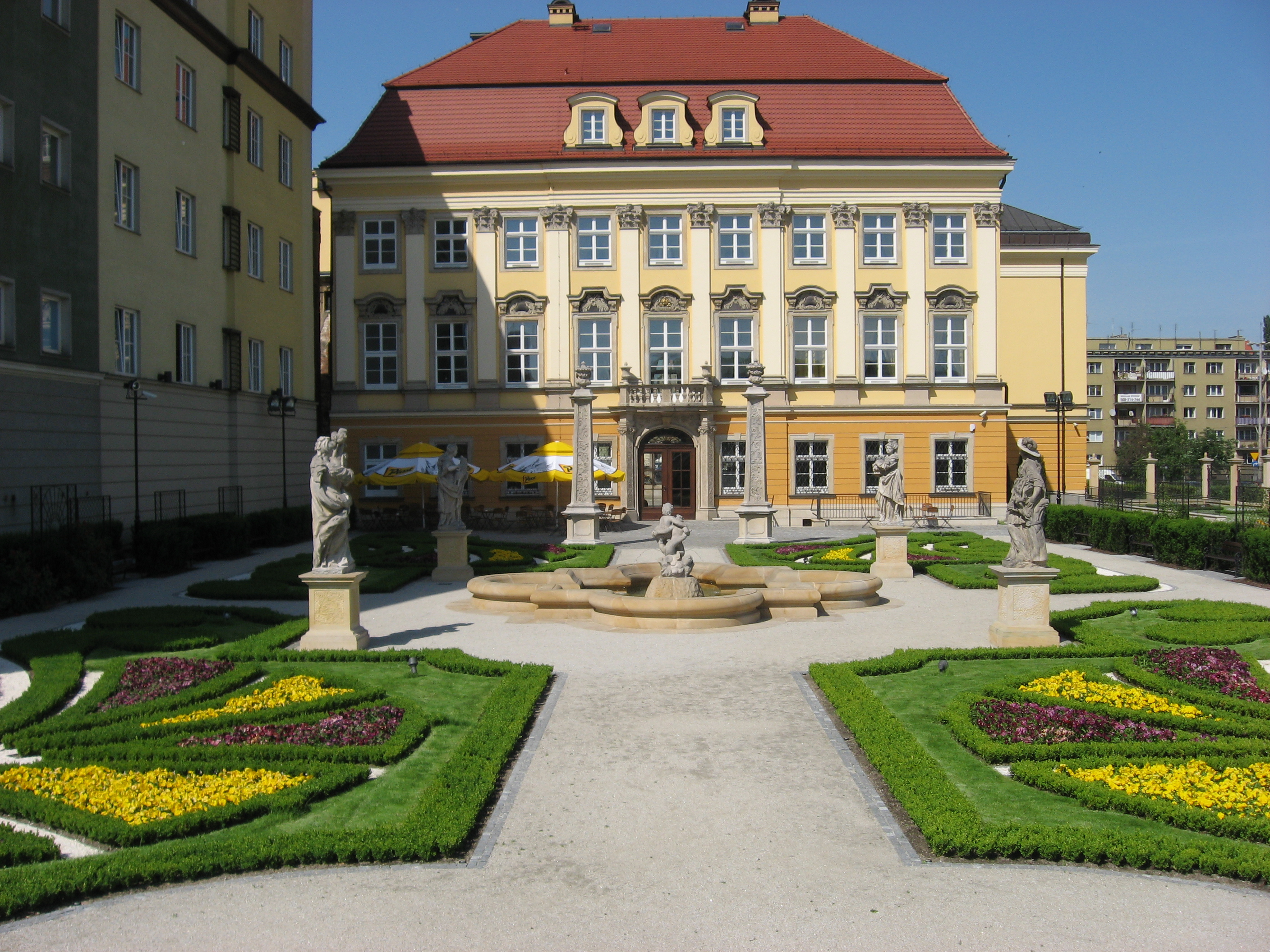 Ogród Barokowy przy Muzeum Miejskim Wrocławia